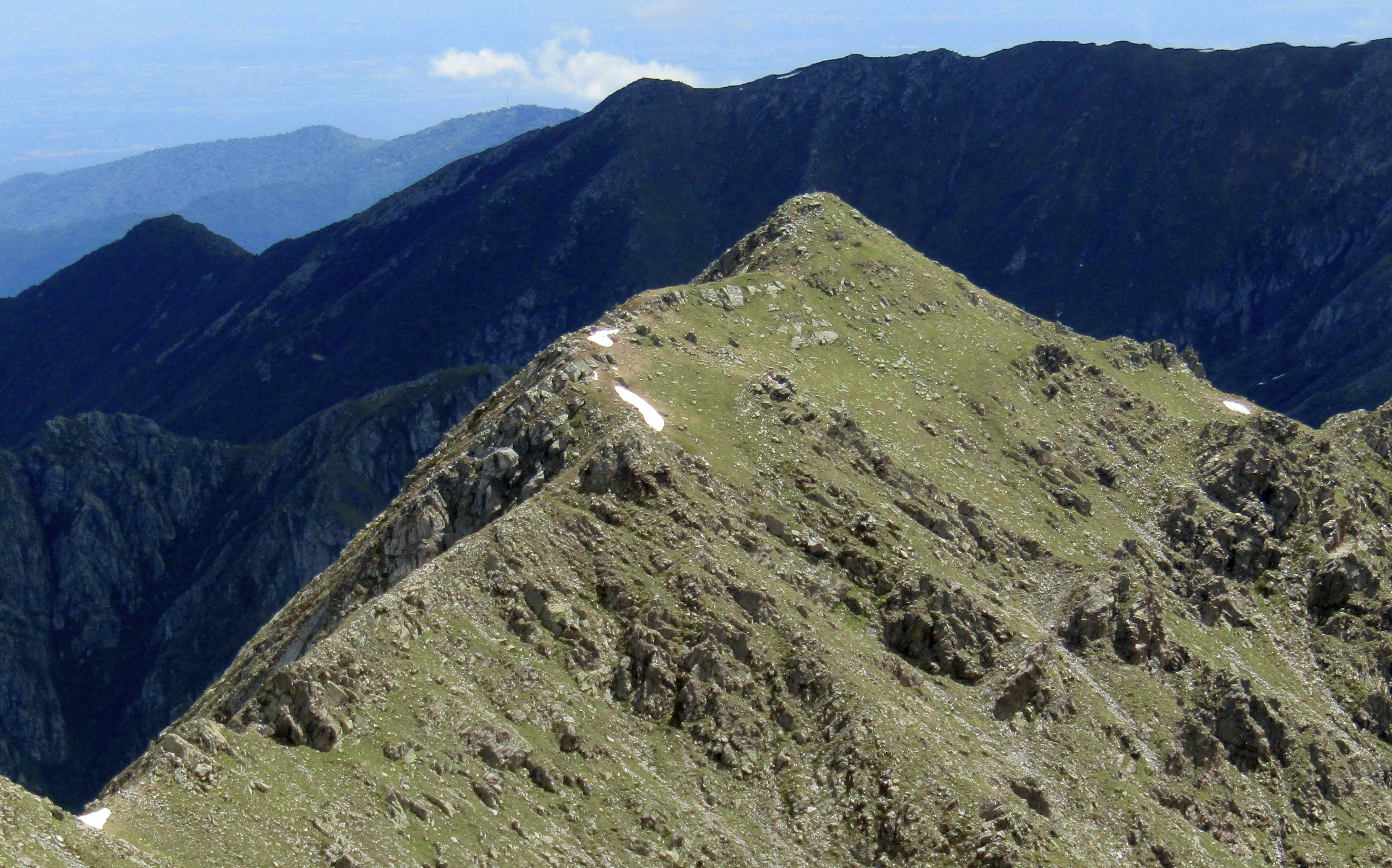 Rocca Maritano (Alpi Graie): vista dal versante sud della Punta Cruvin